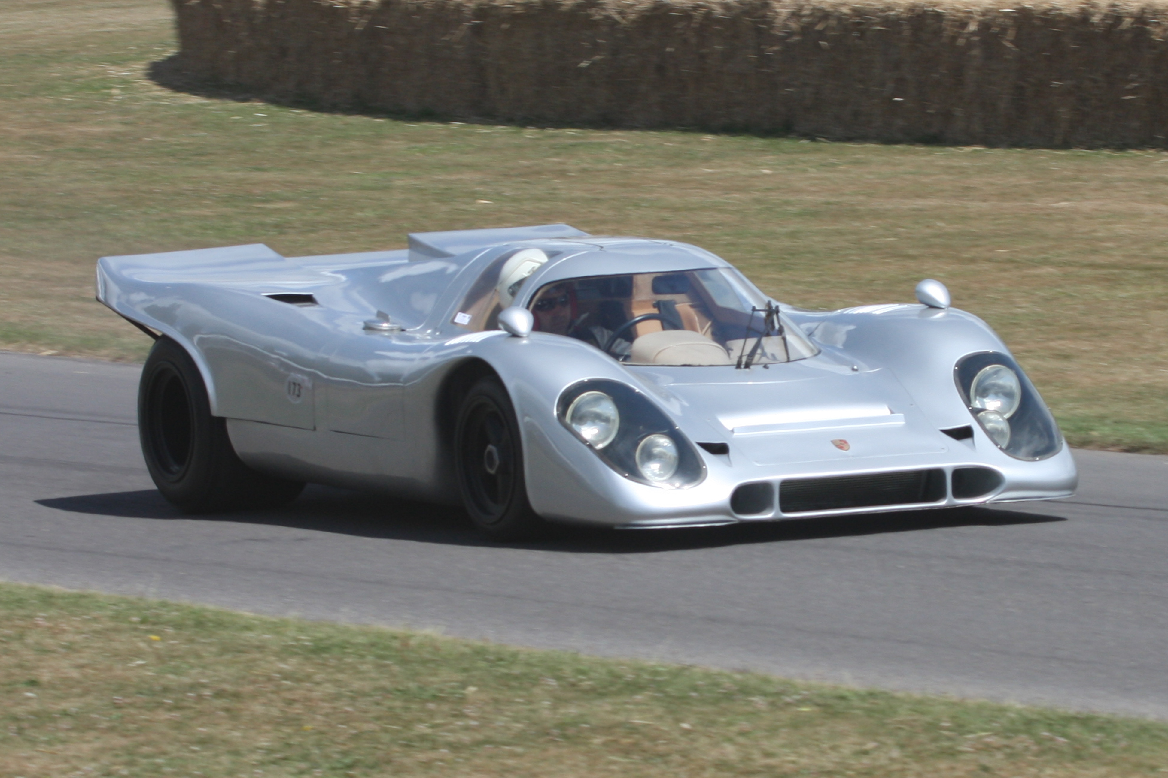 1969 Porsche 917K